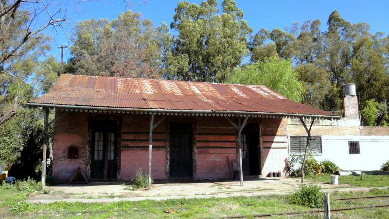 Estación Etchegoyen del FCGU, ramal Lacroze - Rojas